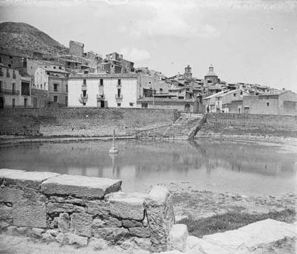 Imatge